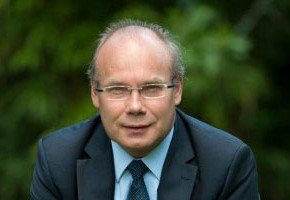 Pierre Pribetich